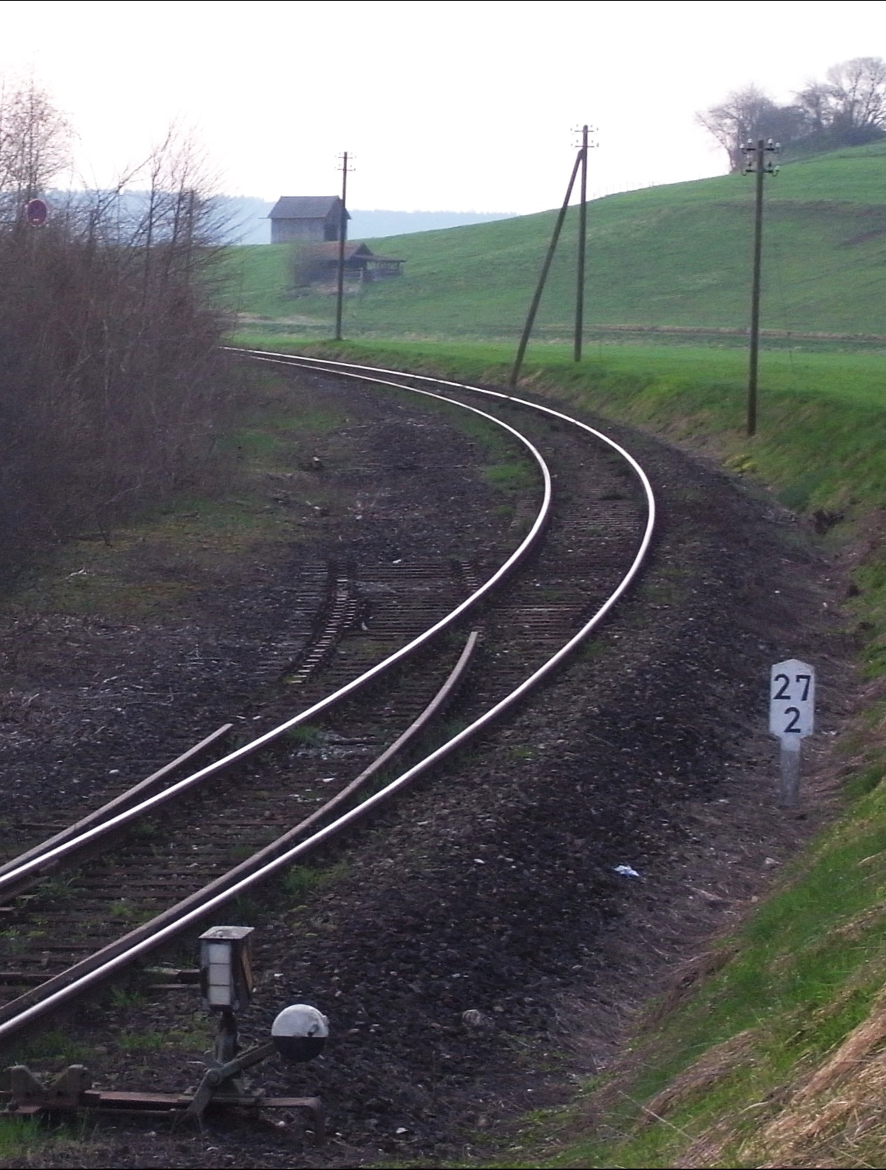 Abzweigung der stillgelegten Eisenbahnstrecke nach Kaufbeuren von der Fuchstalbahn, nordöstlich des Schongauer Krankenhauses